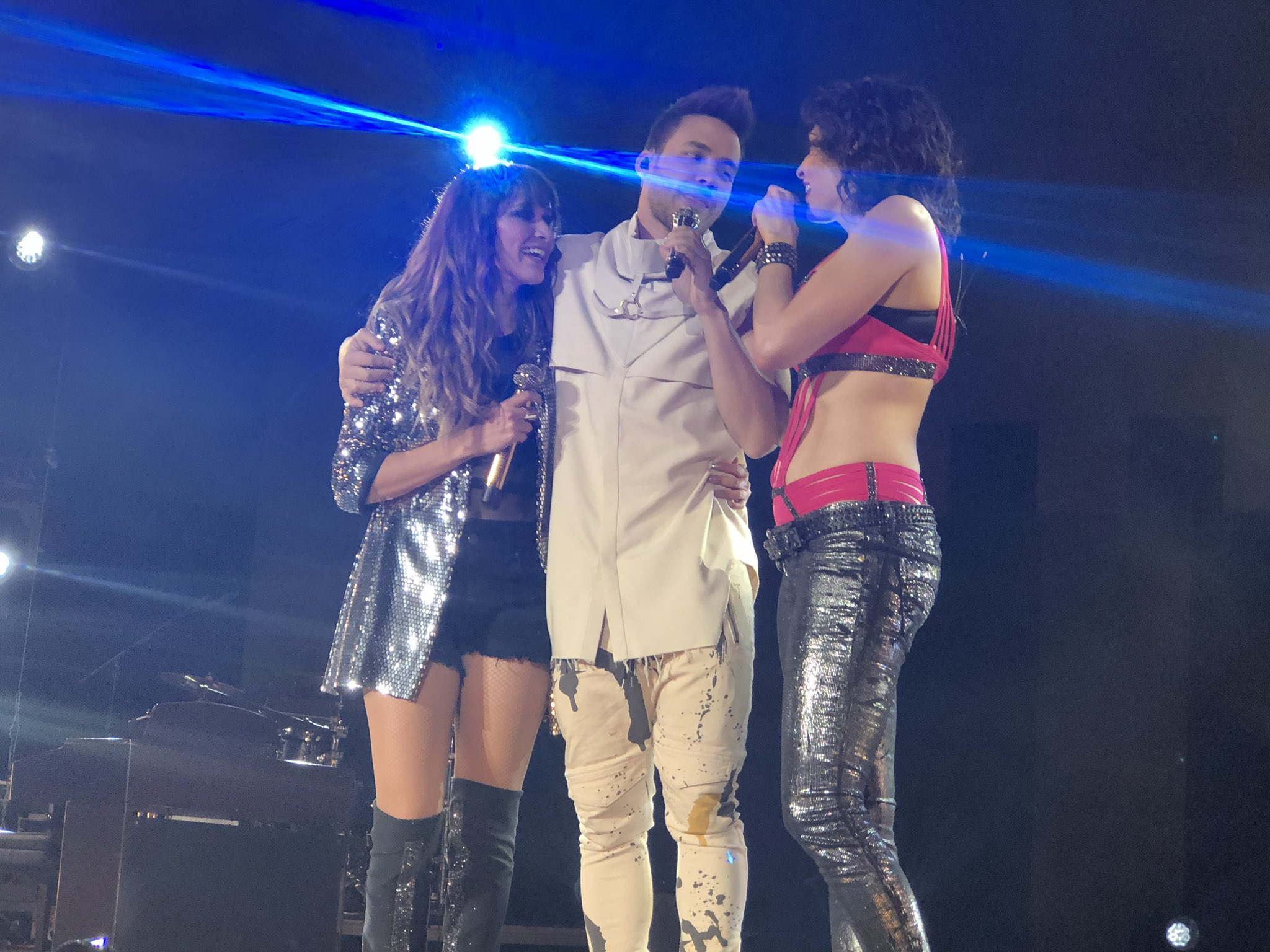 Ha*Ash Auditorio Nacional México 11 de Noviembre de 2018